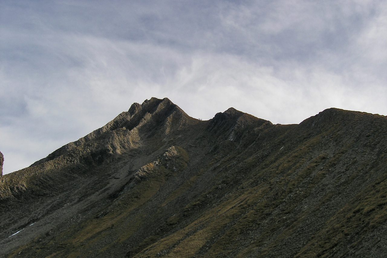 Der Brisen vom Haldigrat aus gesehen